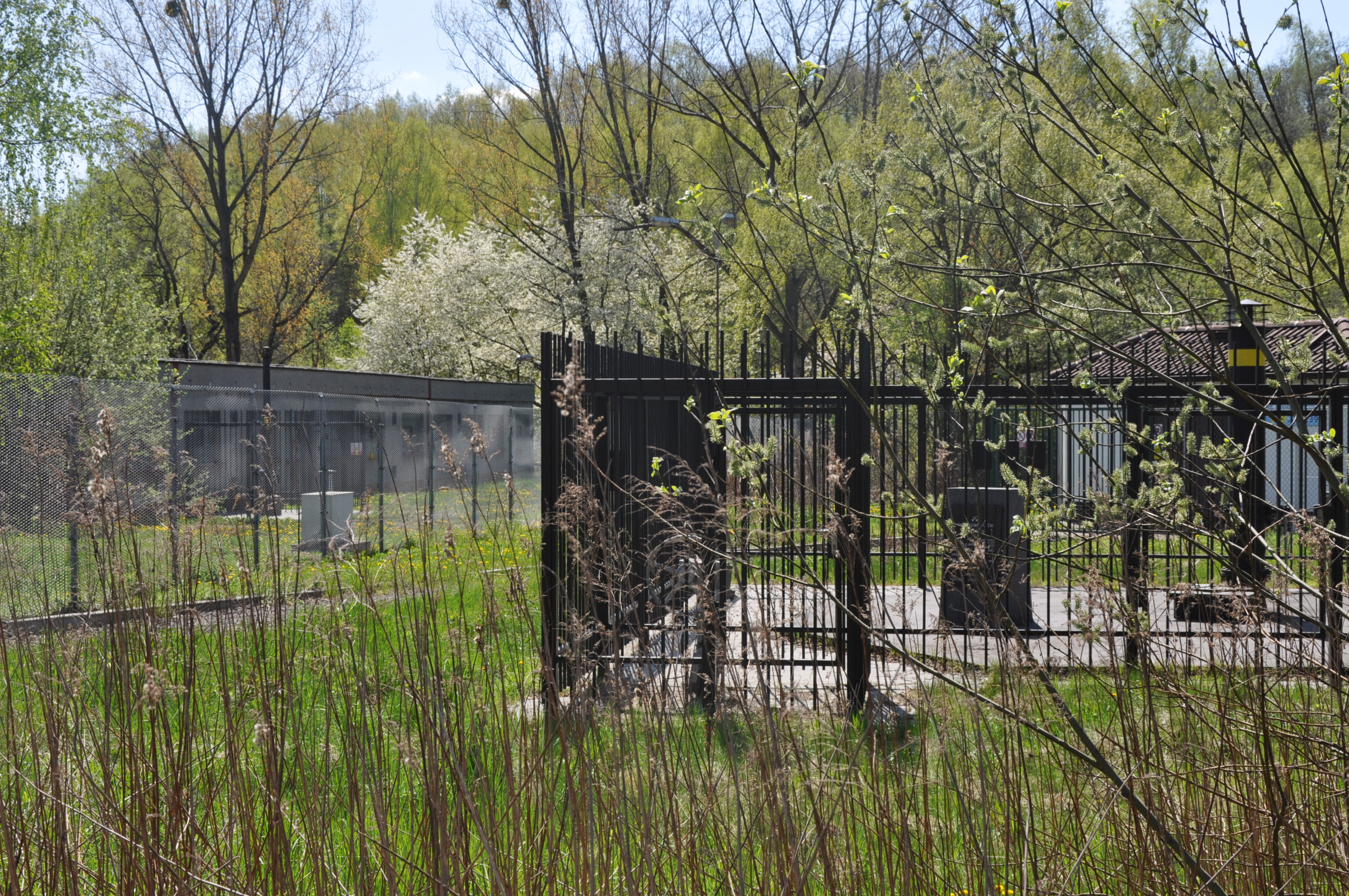 Pohled na důl Luční (Vizina), vlevo je za plotem kutací jáma Zwierzina č. 6, Slezská Ostrava